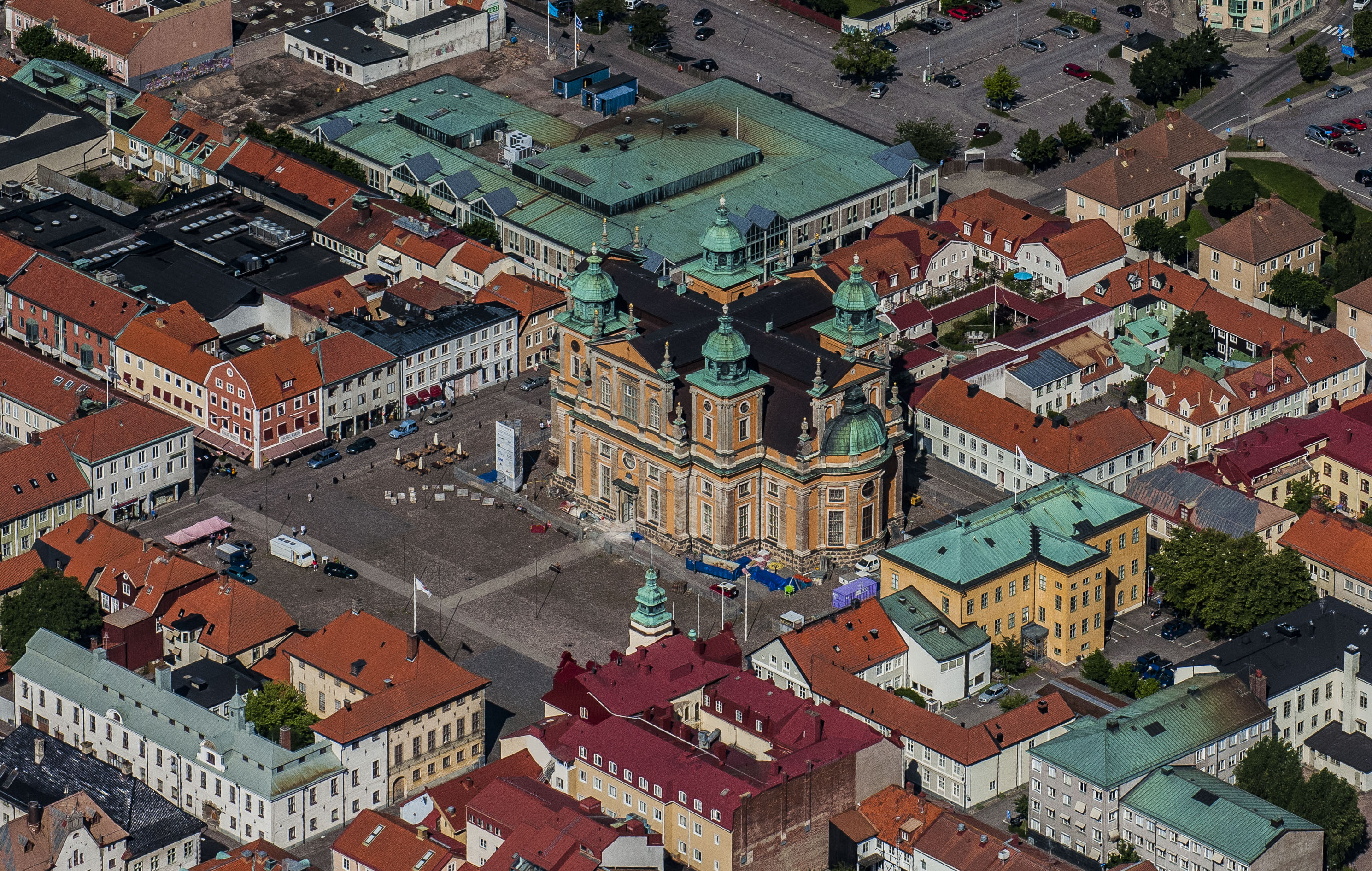 Kalmar stortorg